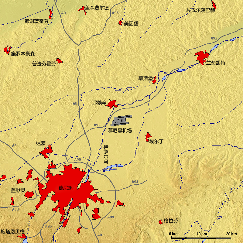 Lage vom Flughafen München